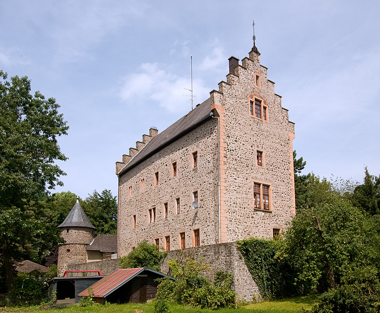 Eppsteiner Schloss in Schotten im Vogelsbergkreis, Deutschland. Ehemaliger Amtssitz der Grafen von Eppstein in Schotten. Das Schloss wurde 1382 durch den Rheinischen Städtebund zerstört und 1402 durch den Landgrafen von Hessen wieder errichtet. 1852 wurde das Schloss in Brand gesteckt und 1853 innen wieder aufgebaut. Das Schloss war von einem Wassergraben umgeben und im vorderen Teil standen die herrschaftlichen Scheuen, um den Zehnten aufzunehmen.